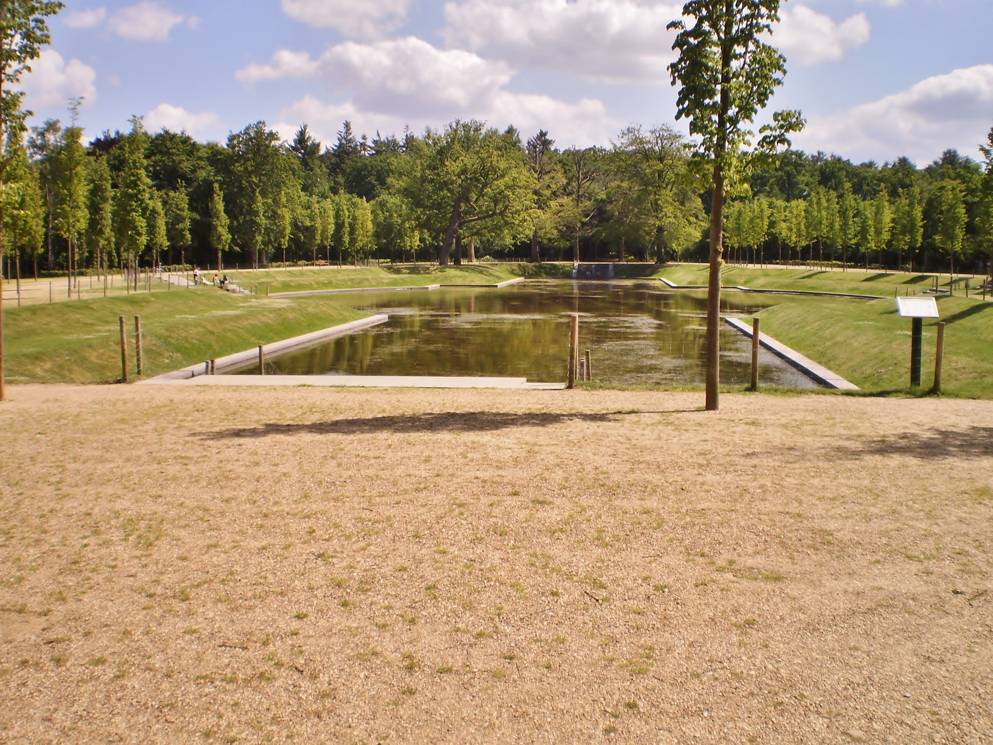 Baarnse Bios met de Grote Kom